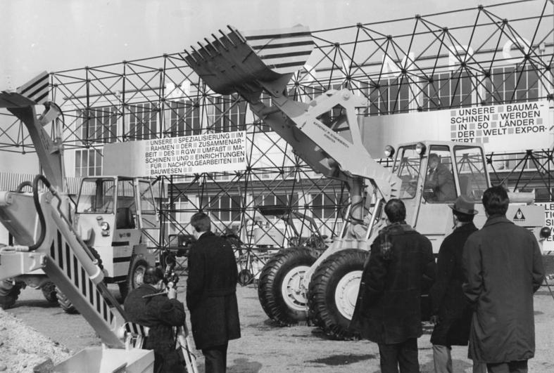 Leipzig, Frühjahrsmesse, Freigelände, Baumaschinen ZB-Gahlbeck-2-3-69-Sche-Leipzig: Frühjahrsmesse 1969 - Auf dem Messegelände stellt die Volksrepublik Polen innerhalb des Freigeländes A III Baumaschinen aus.